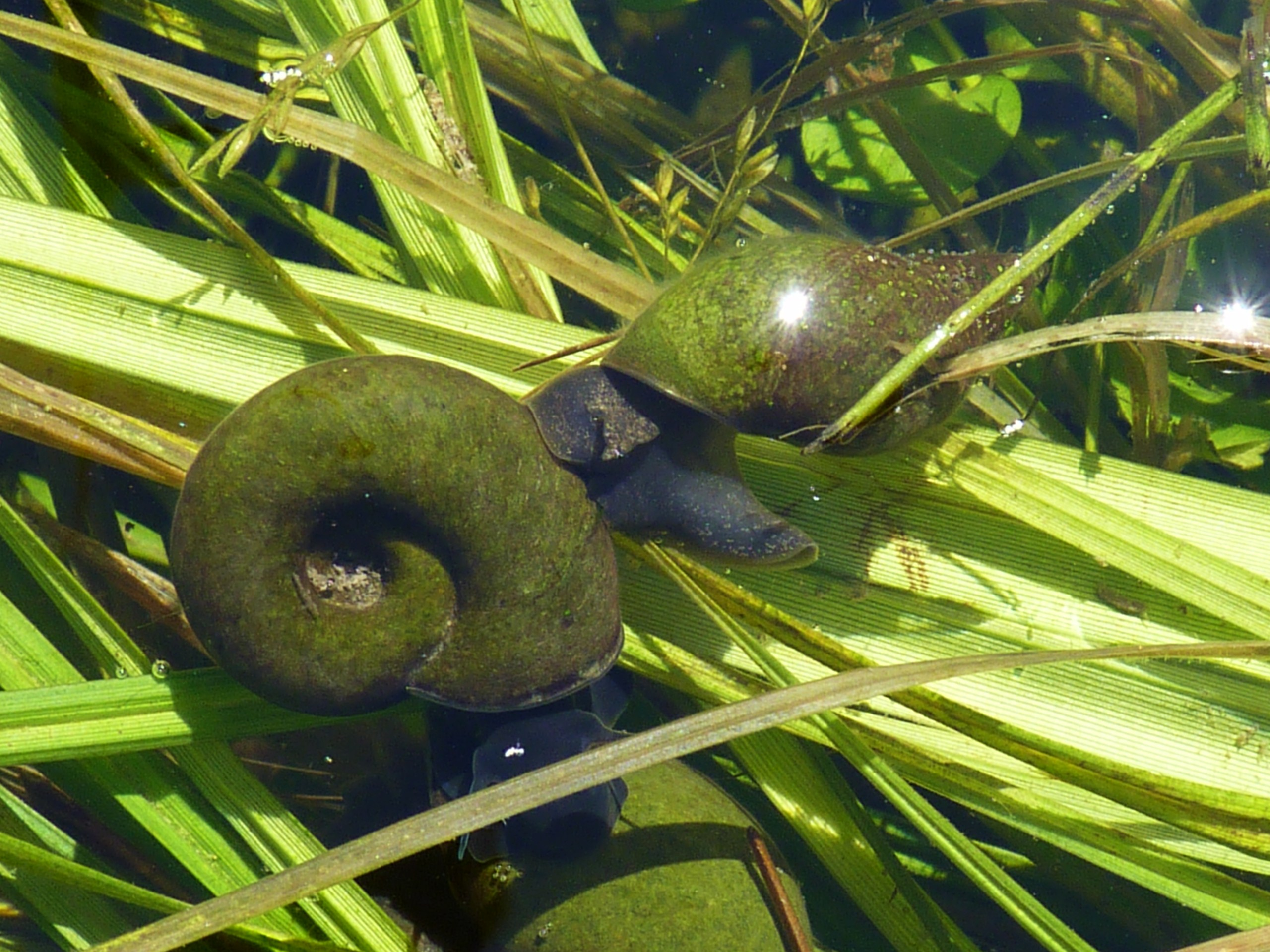 Posthornschnecke (Planorbarius corneus) und Lymnaea stagnalis